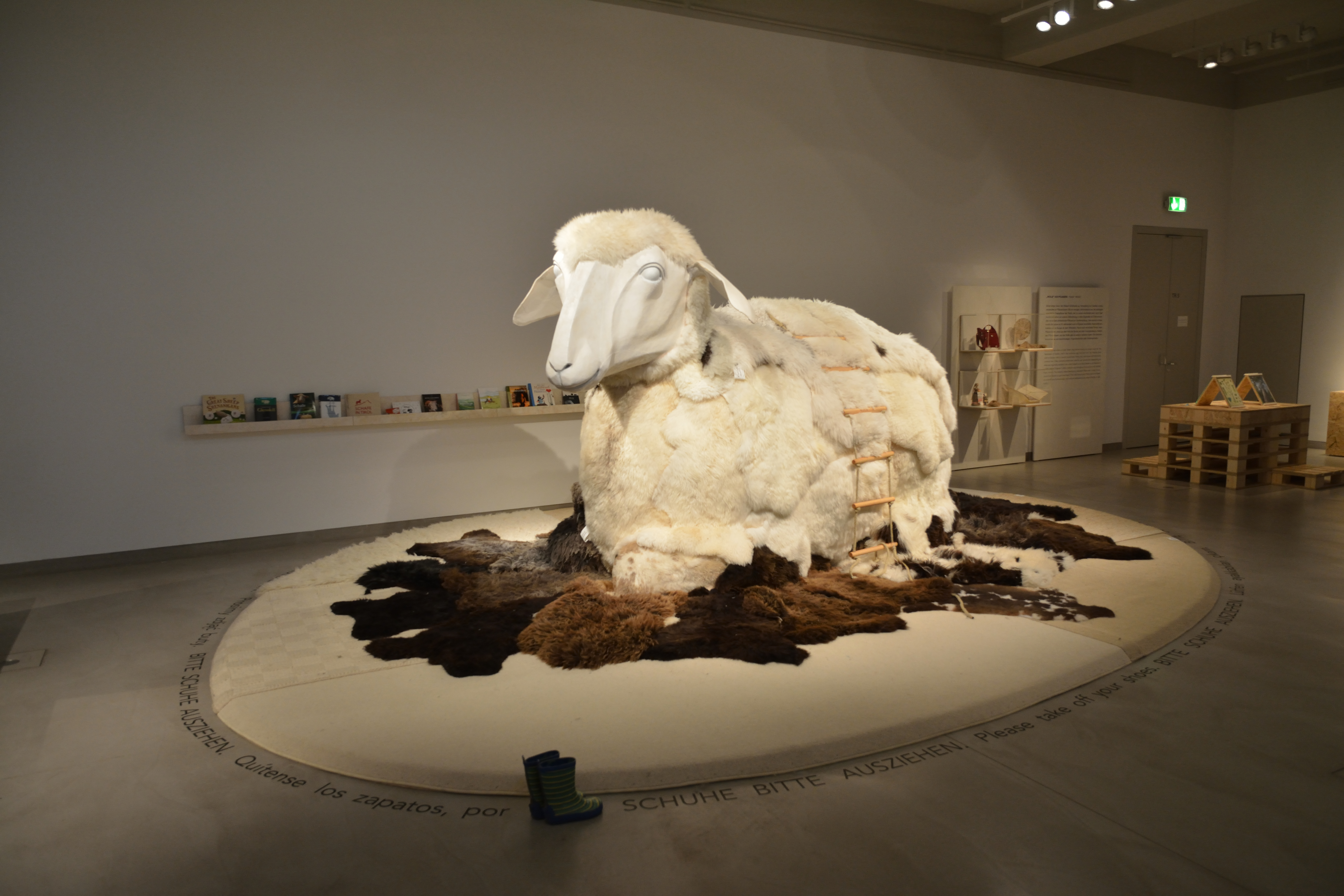 Impressionen aus dem Museum Europäischer Kulturen.Sonderausstellung 100 Prozent Wolle vom November 2017 bis Juni 2019.